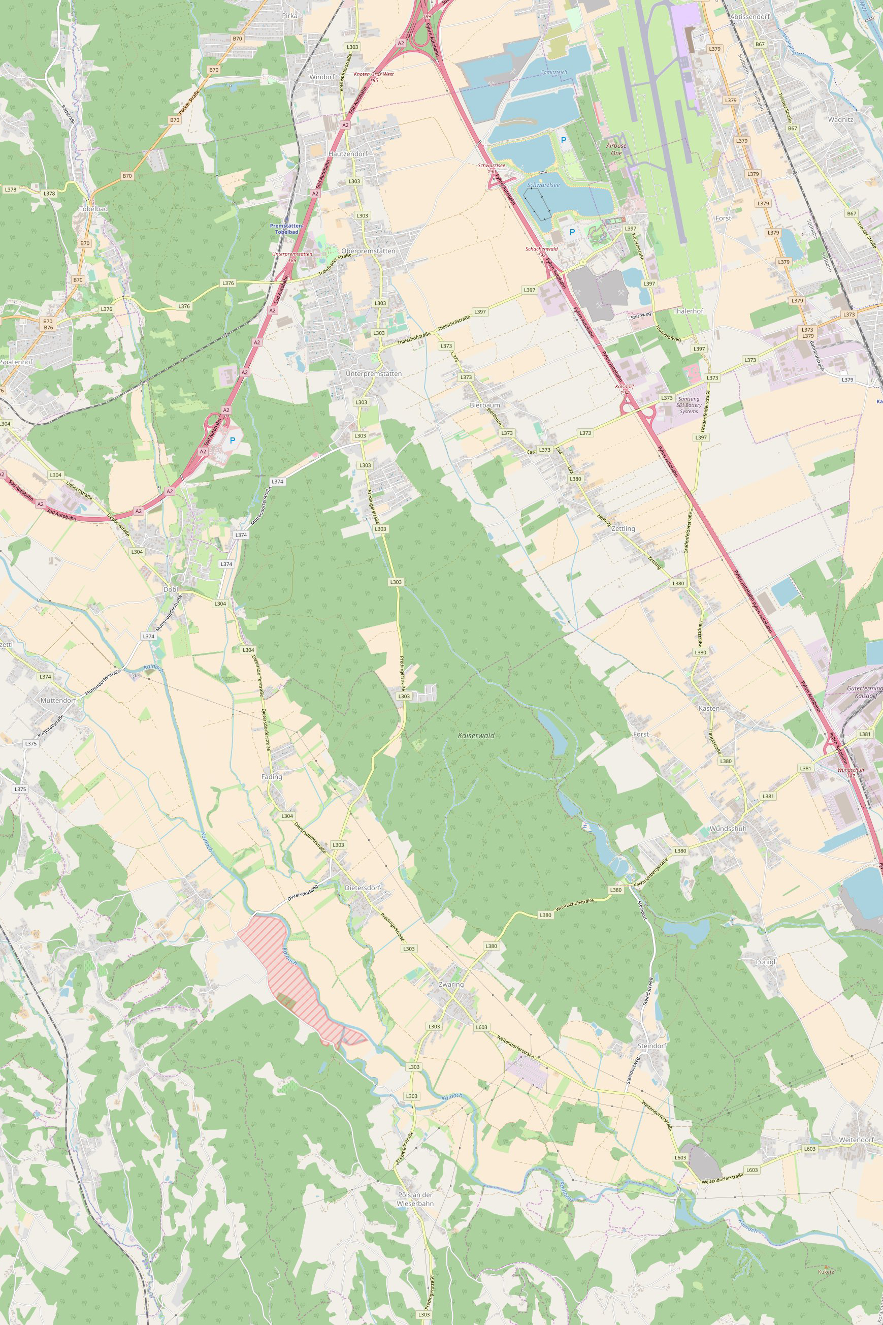 Übersichtskarte des Kaiserwaldes in der Steiermark (OSM) This map may be incomplete, and may contain errors. Don't rely solely on it for navigation.